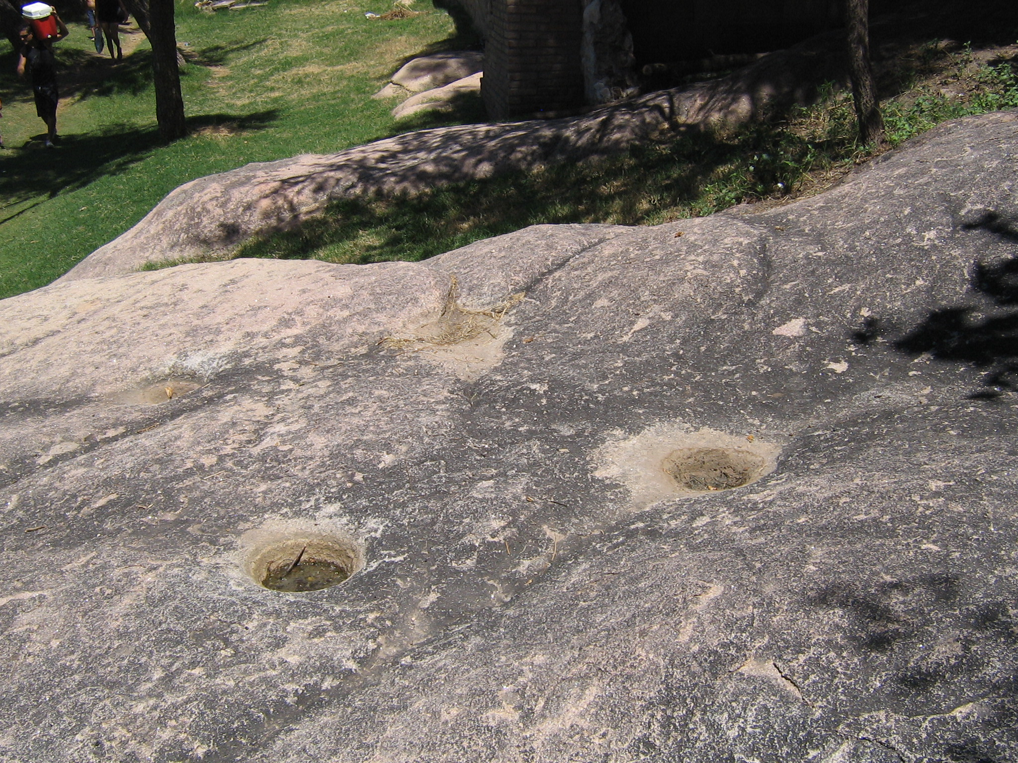 Morteros construidos por los indios comechingones